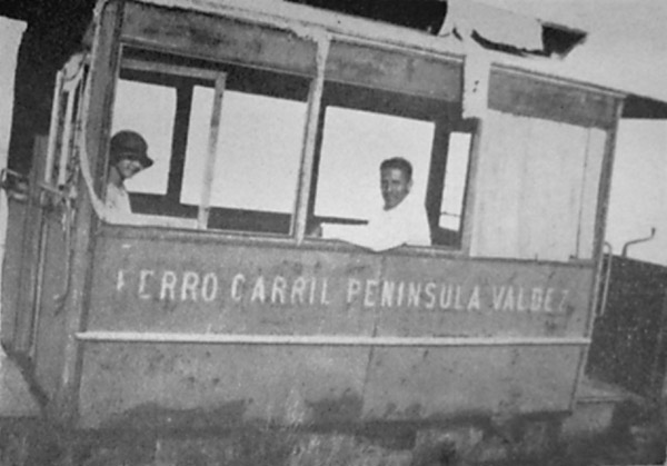 El único coche, de cuatro ruedas, del ferrocarril siguiendo unos años de abandono en el comienzo de los años 1920.